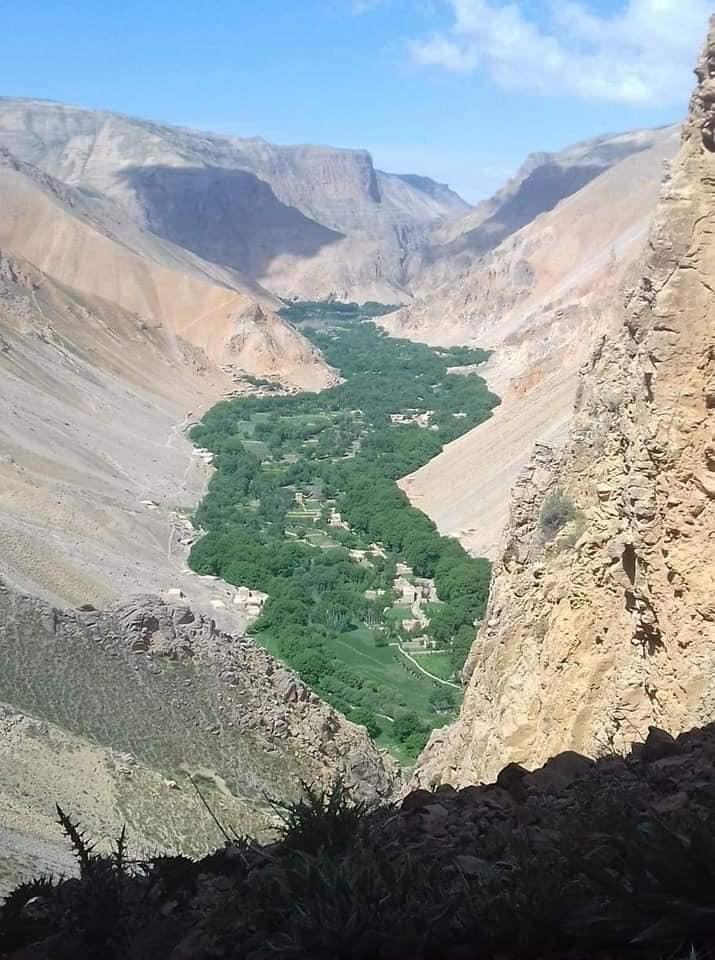 منطقه تاجک نشین در غور